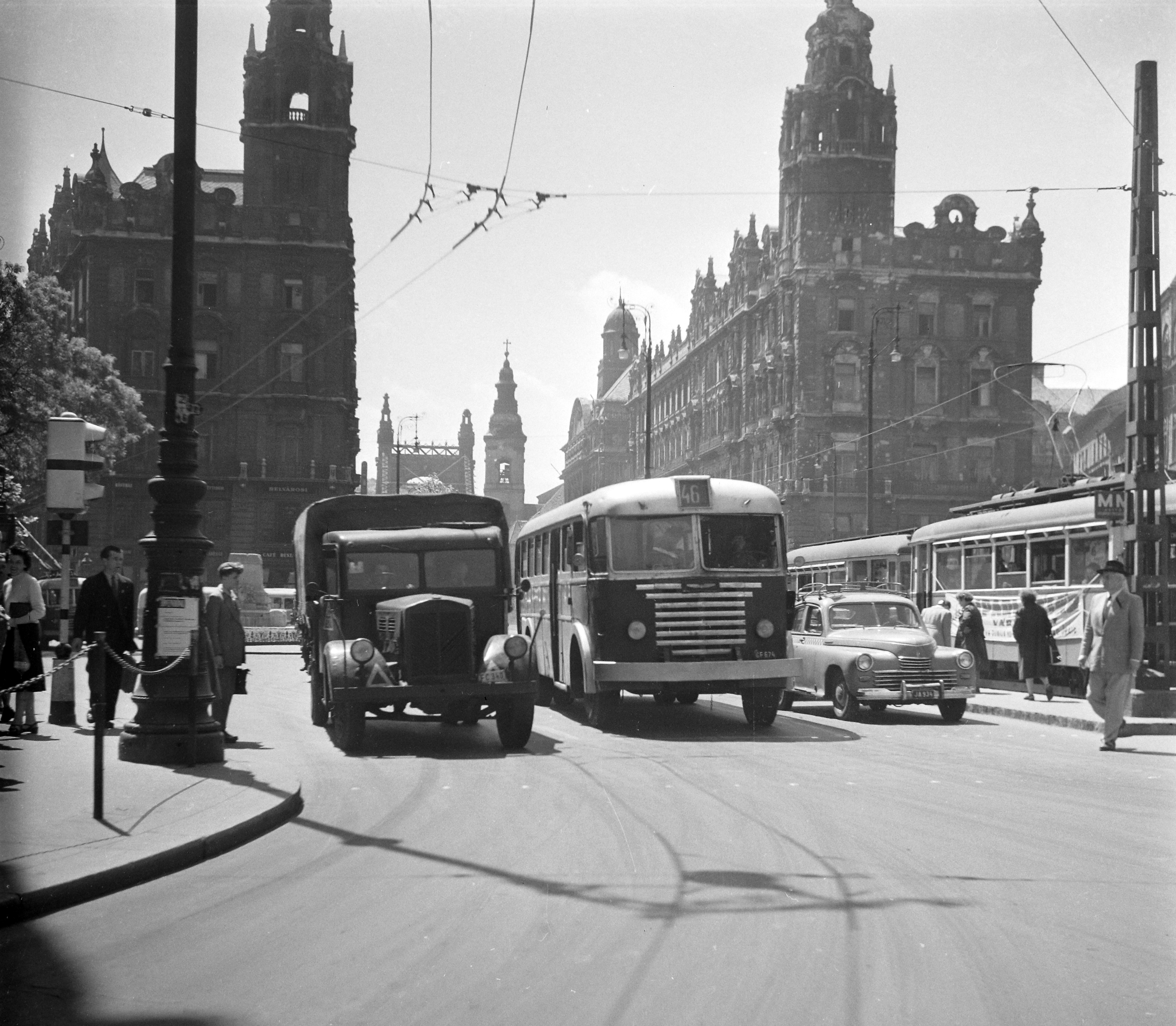 Ferenciek tere (Felszabadulás tér) a Szabad sajtó út felé nézve. Háttérben az Erzsébet híd. Location: Hungary, Budapest V. Tags: number plate, tram, tram stop, signal, bus, commercial vehicle, M20 Pobieda, genre painting, taxicab, Budapest Title: Ferenciek tere (Felszabadulás tér) a Szabad sajtó út felé nézve. Háttérben az Erzsébet híd.